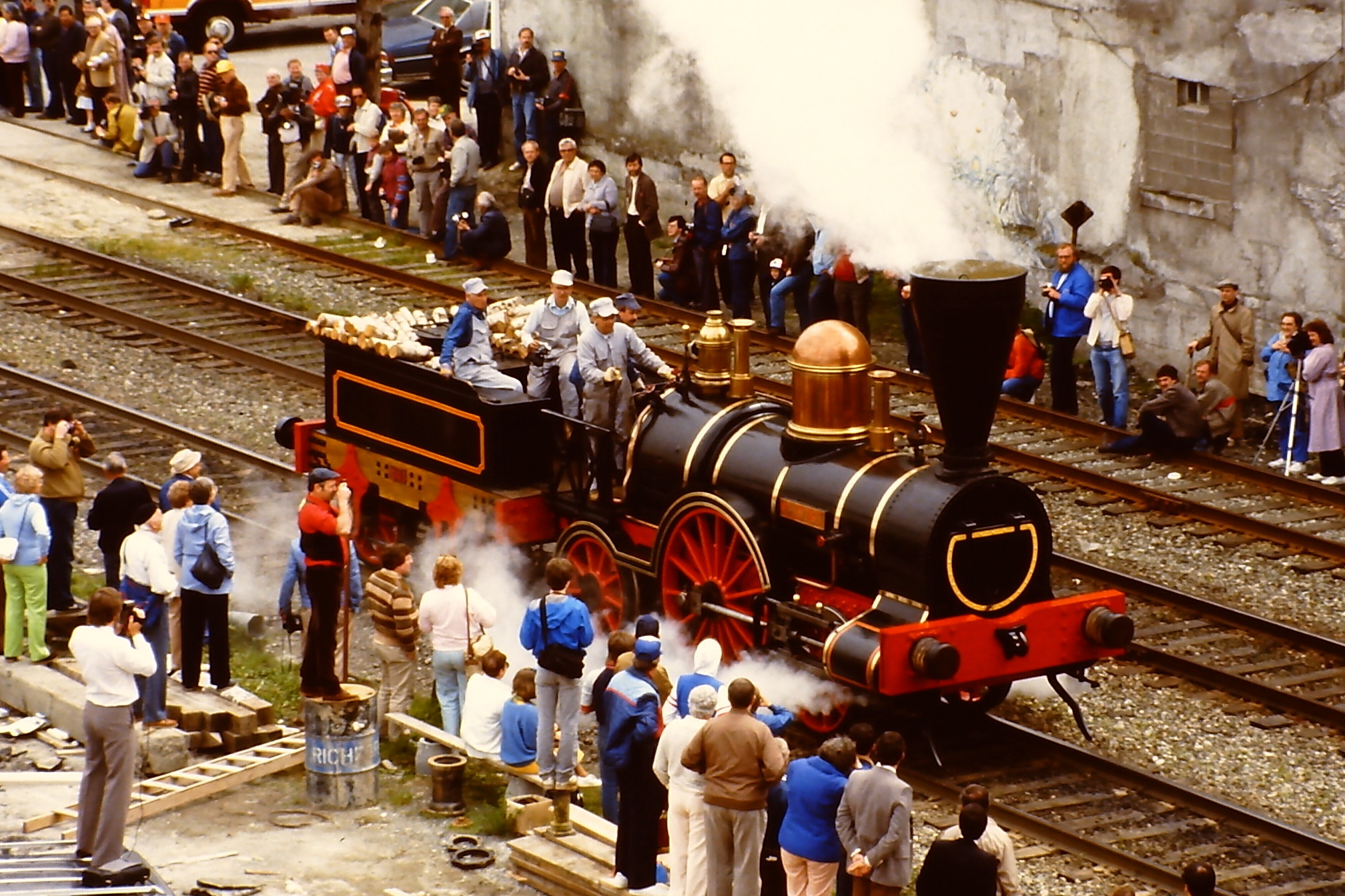 Dampflokomotive John Molson (Replikat) auf der SteamExpo 86